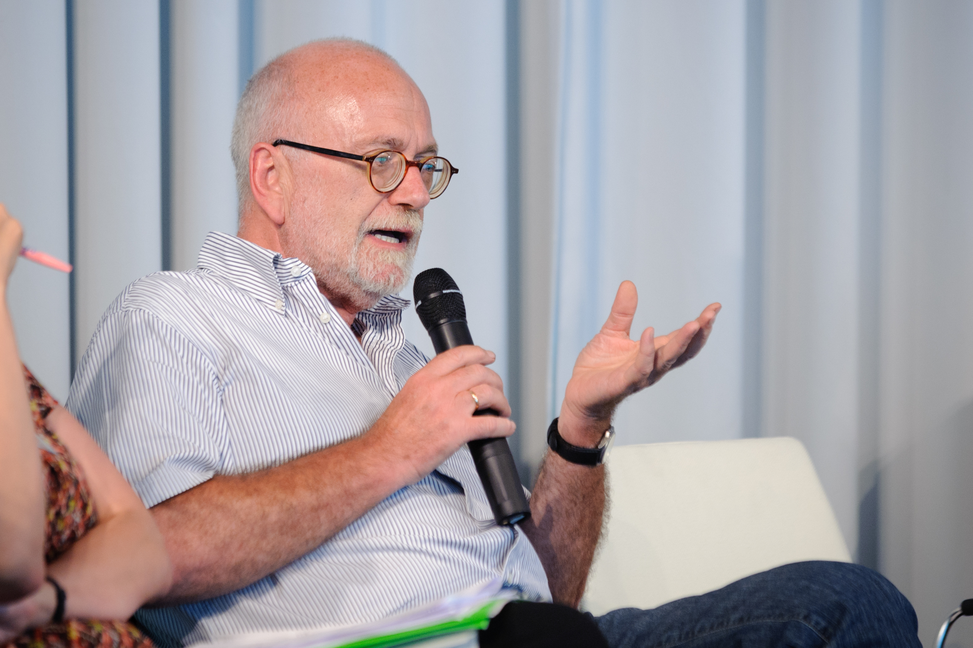 Jürgen Roth (Autor, Journalist) Foto: Stephan Röhl